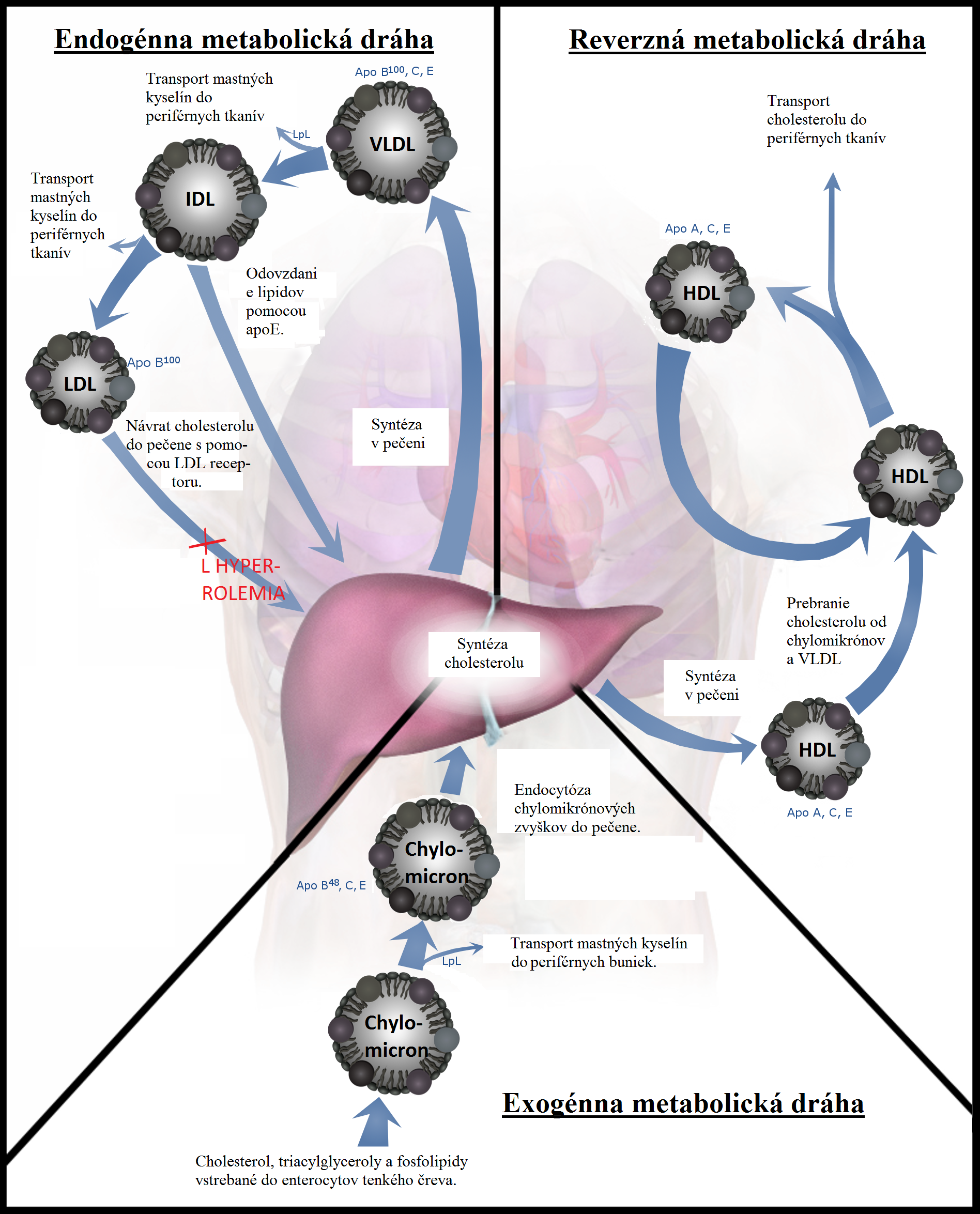 Schéma metabolizmu lipoproteínov